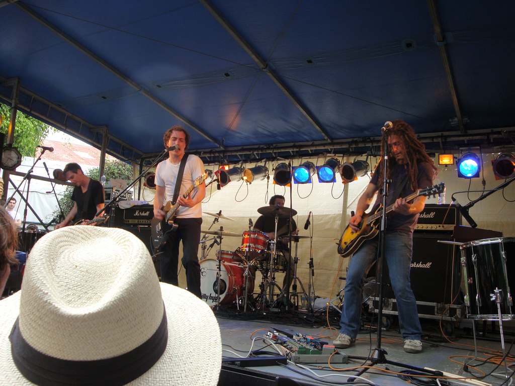 Moneen